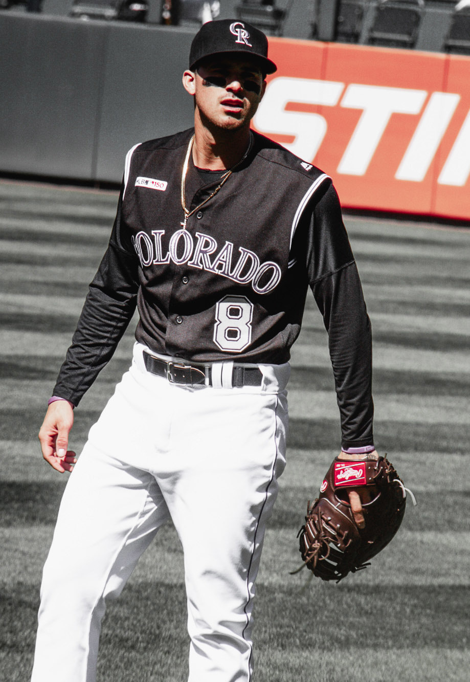 Josh Fuentes